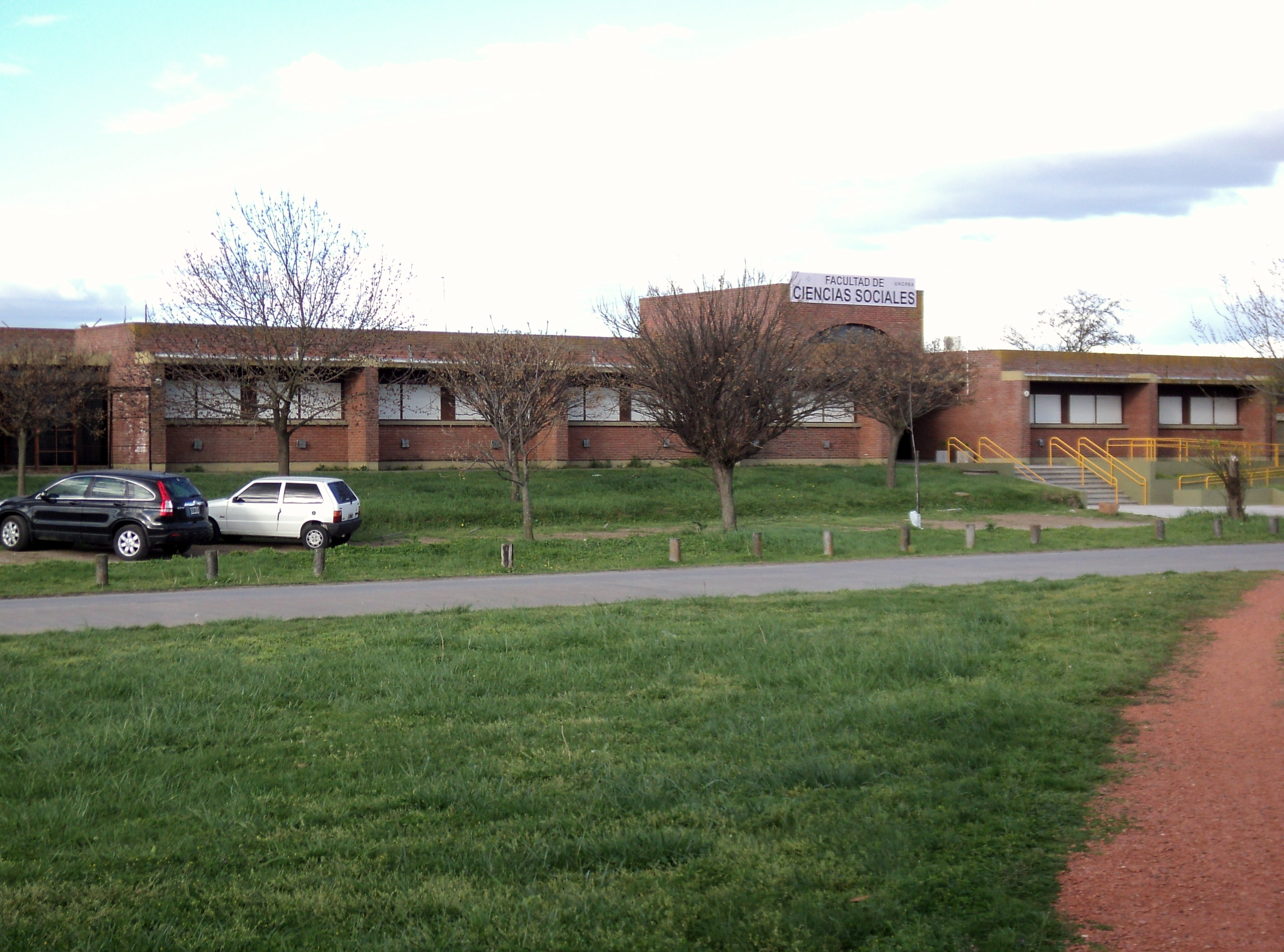 la facultad de sociales el campus de la ciudad